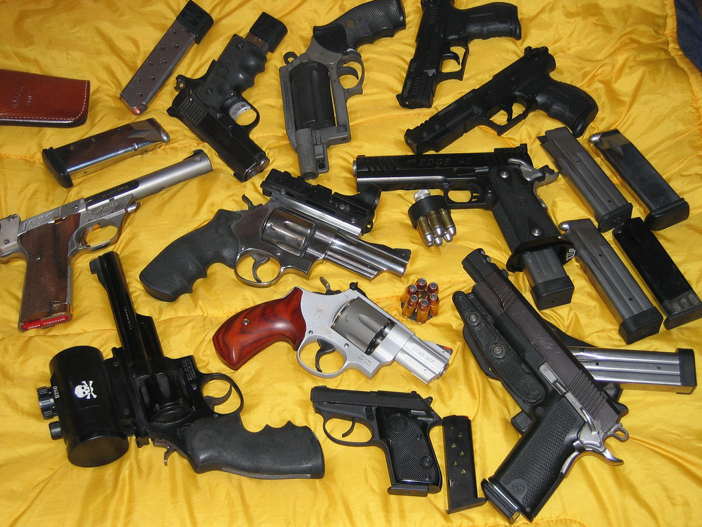 armas las armas sirven para aver paz